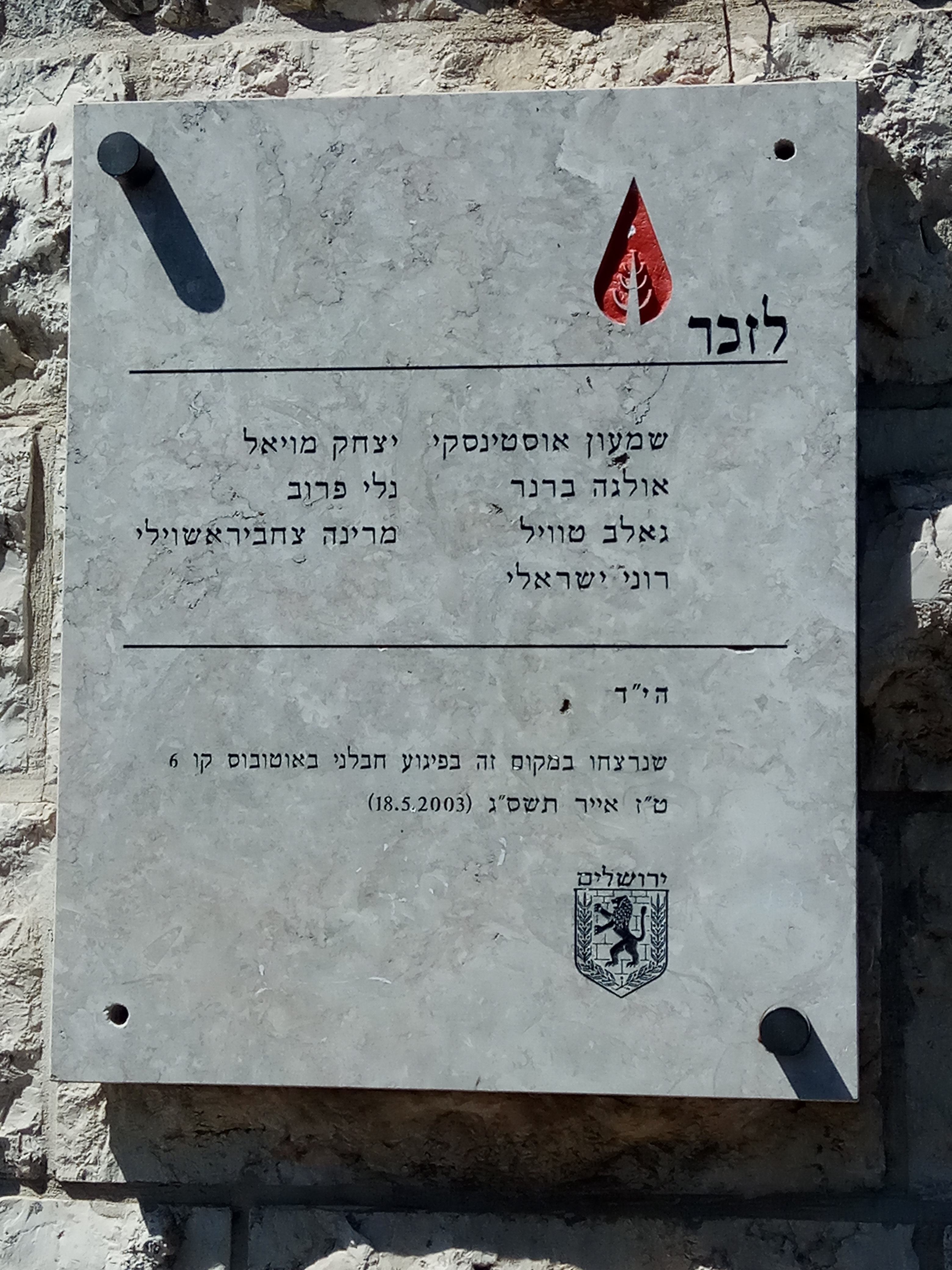 שלט הנצחה בגבעת המבתר לנרצחי הפיגוע בקו 6 ב-2003